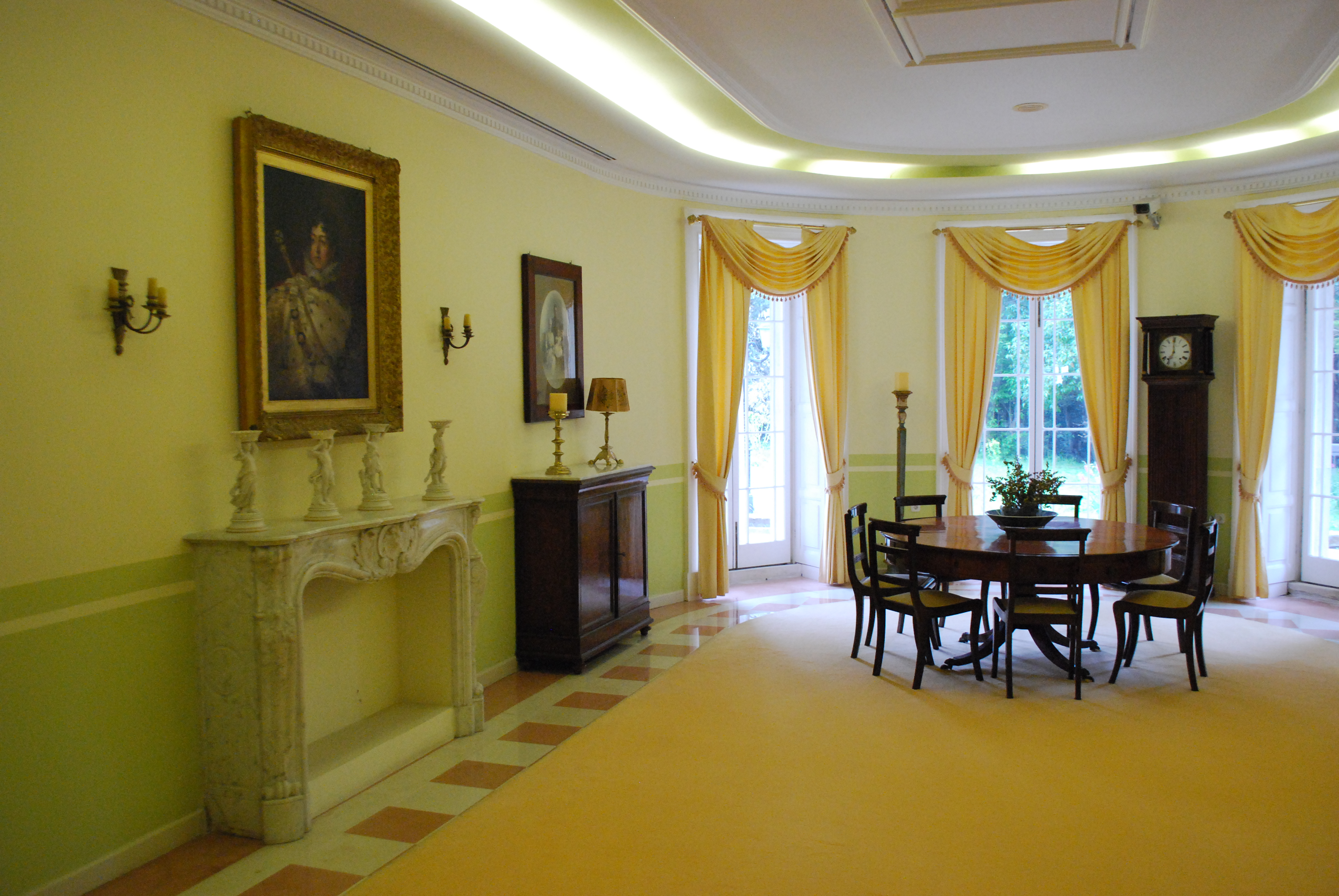 Vue du musée de Palaiopolis, dans la villa "Mon Repos" à Corfou.